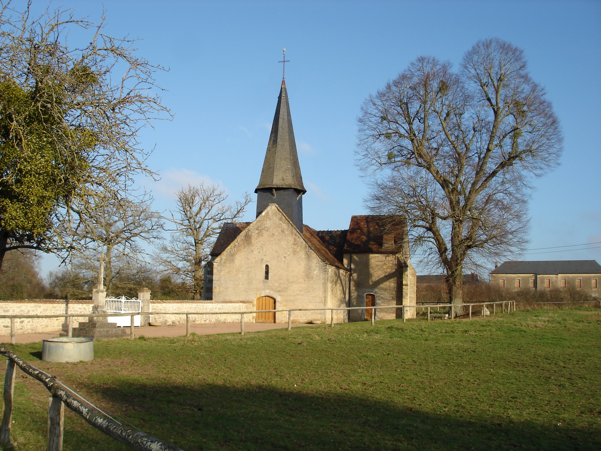 La Motte-Feuilly (36) : L'église Saint-Hilaire.